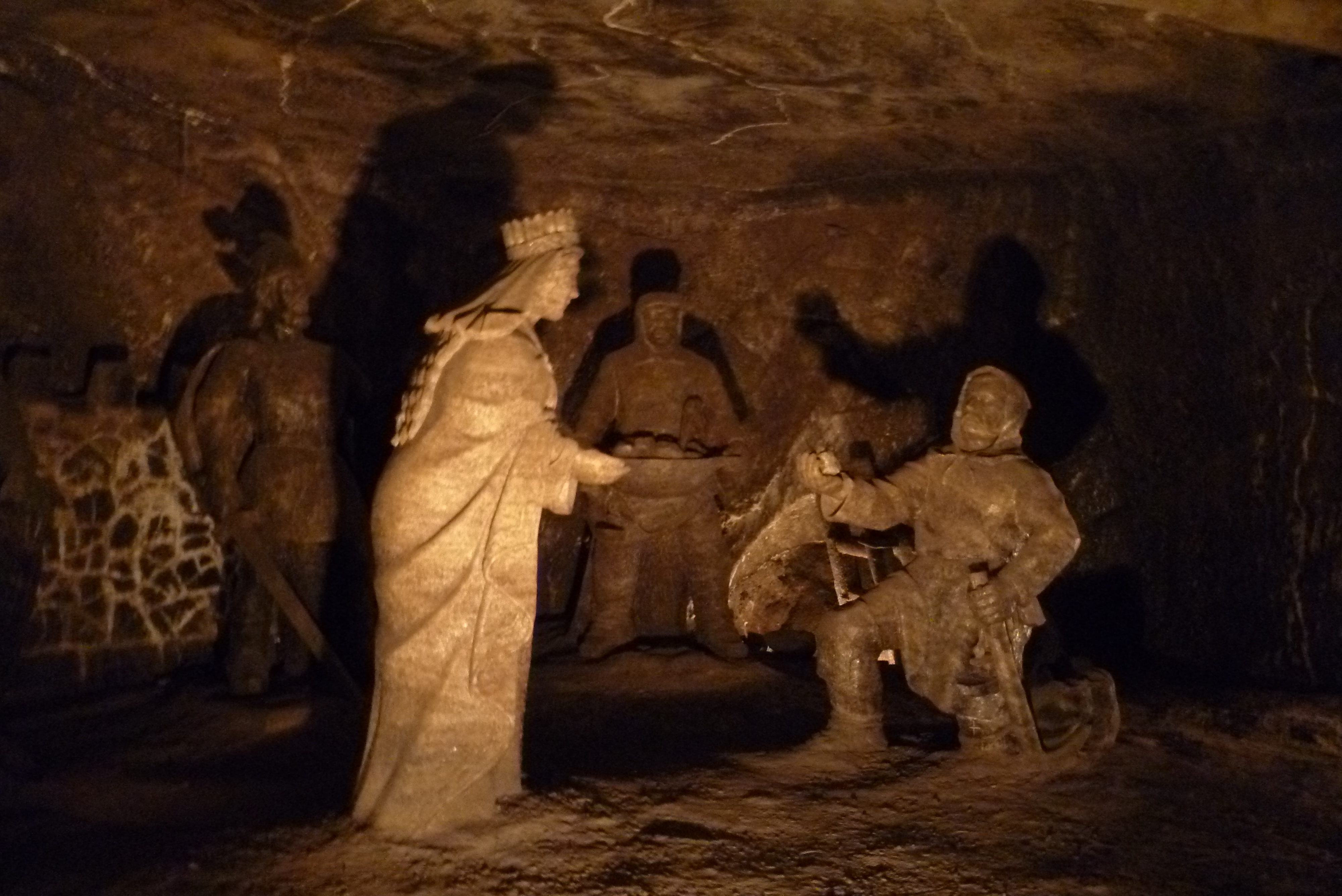 Szent Kinga sószobra a wieliczkai sóbányában